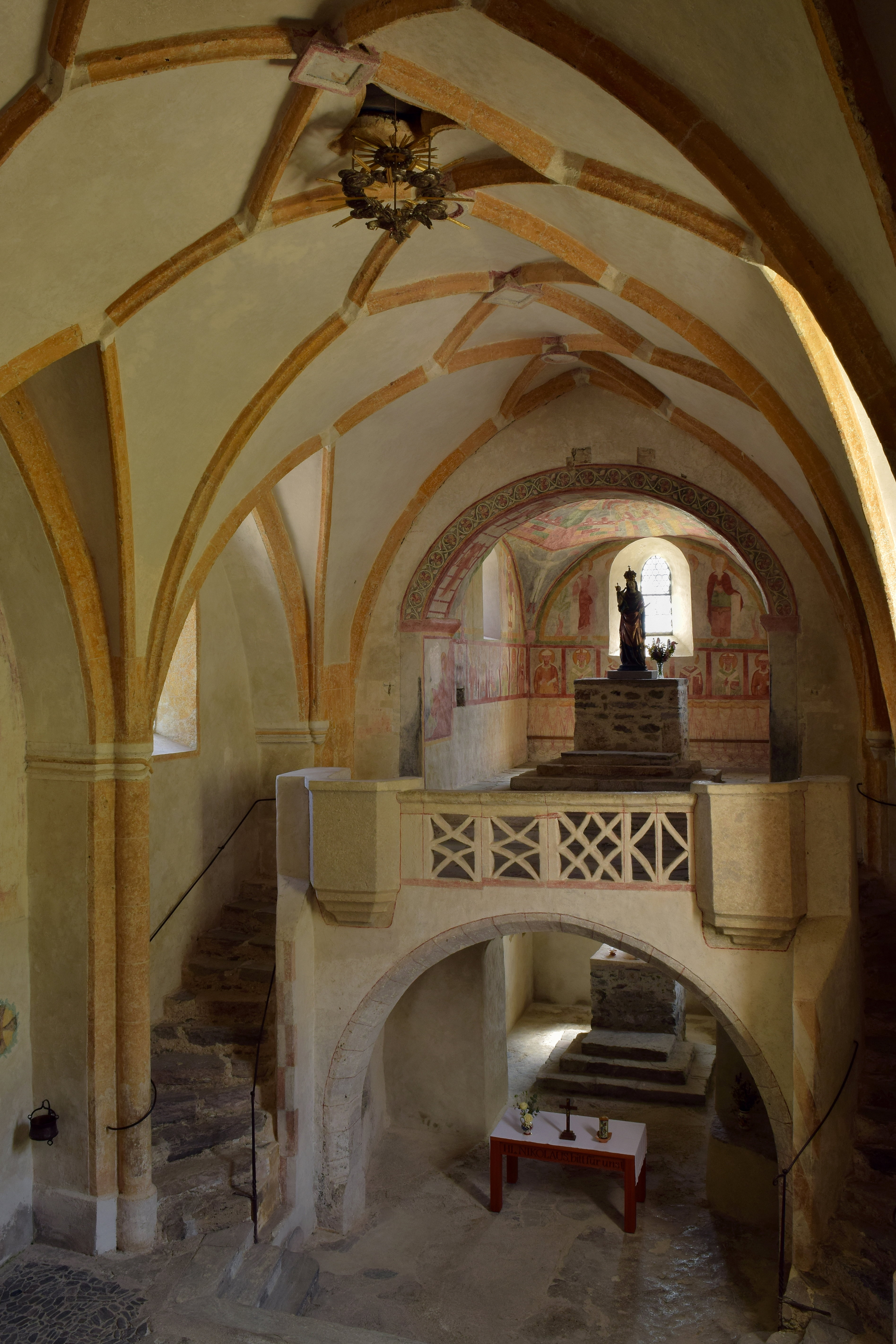 Die Nikolauskirche in Ganz in der Gemeinde Matrei in Osttirol hat zwei übereinander angeordnete Chöre.